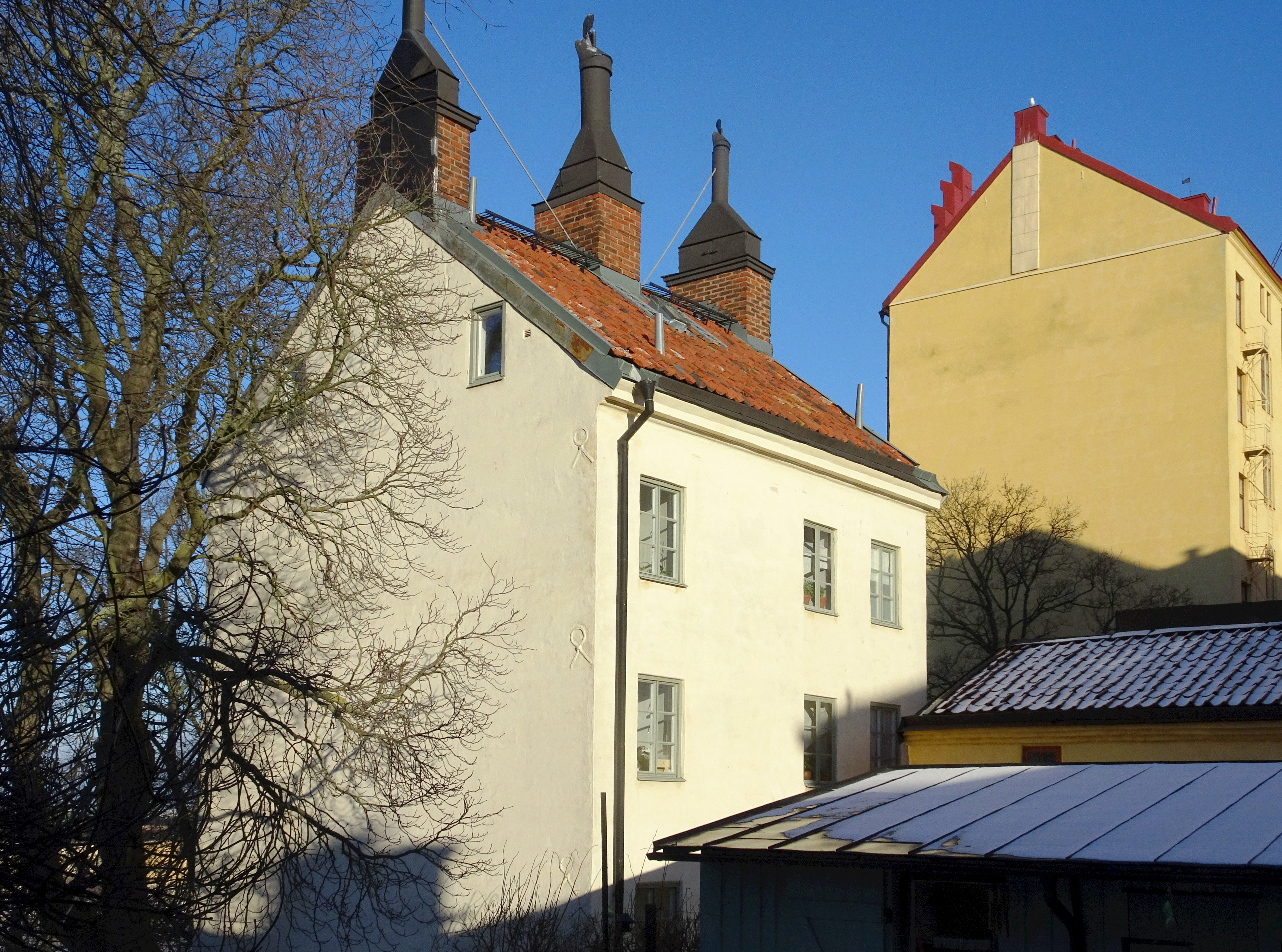 Kattfoten mindre 10, Bastugatan 46, bakgård